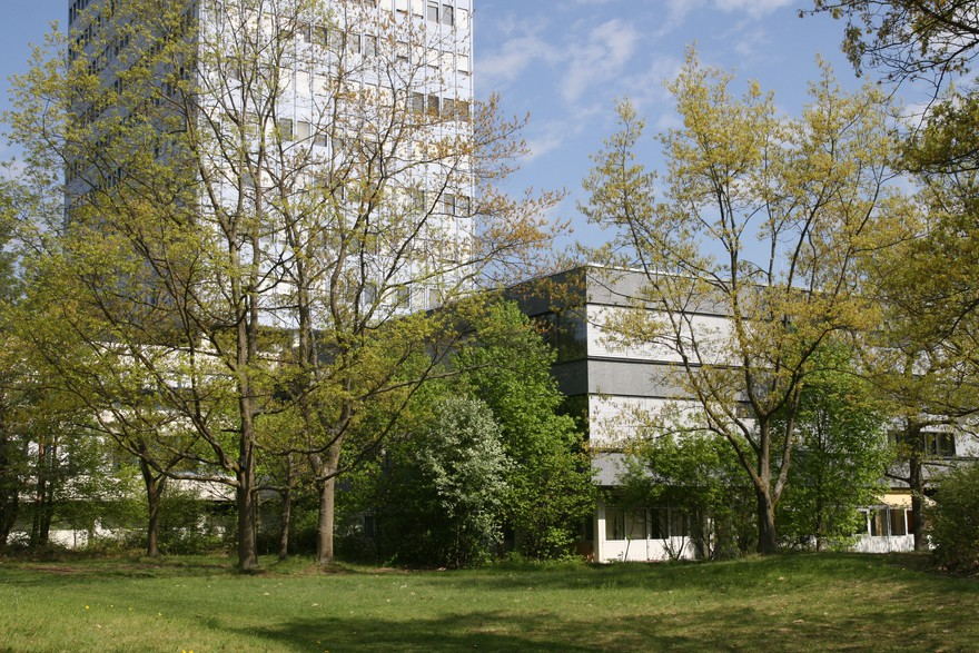 Fassade des RRZE Gebäudes